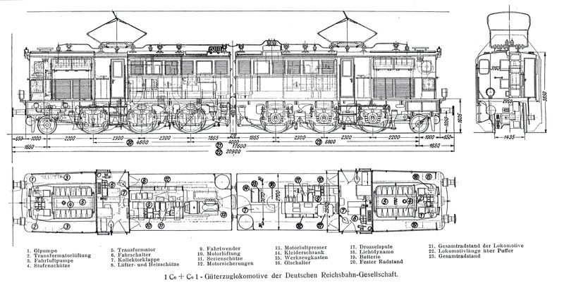 Przedwojenny schemat lokomotywy E95